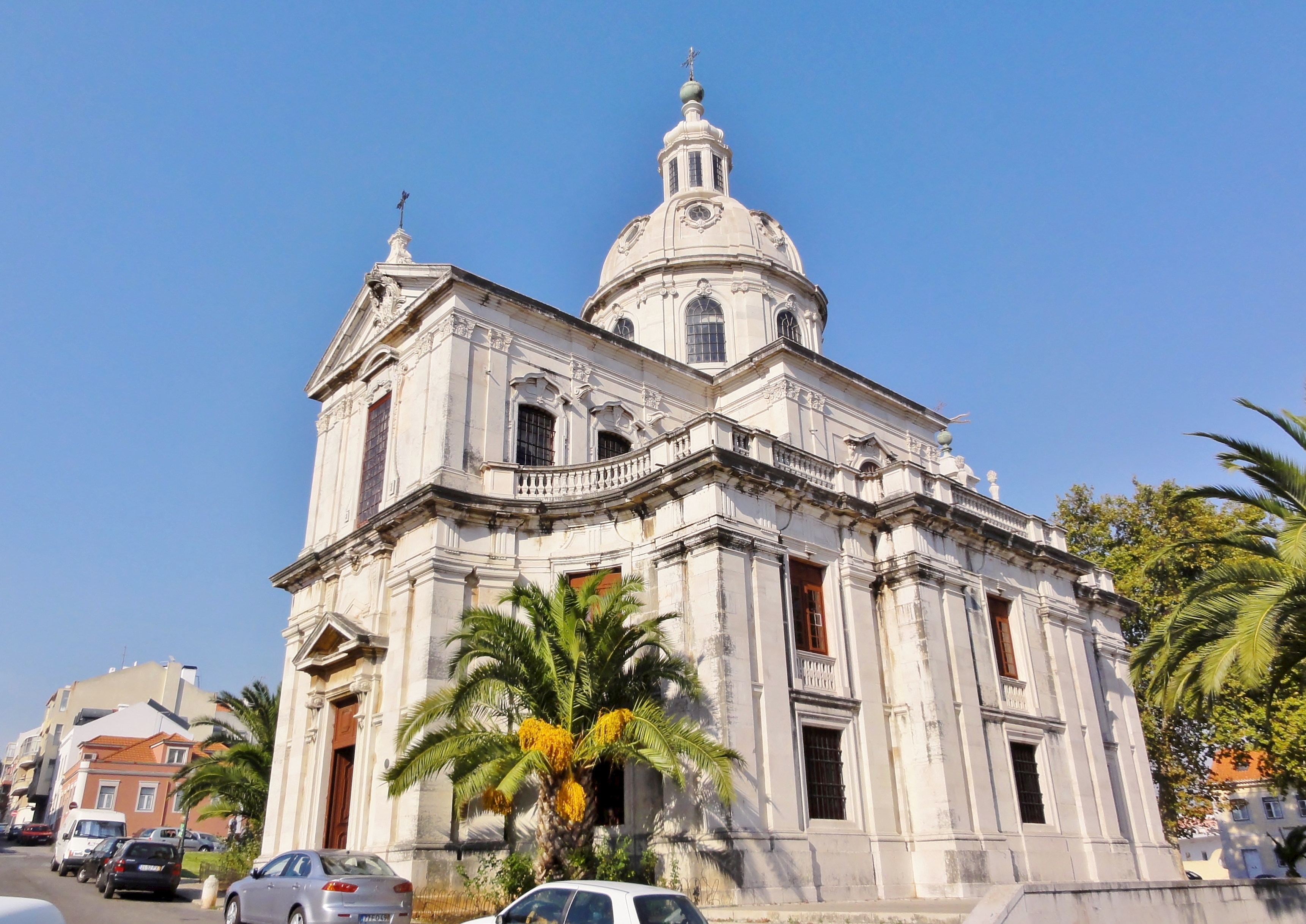 Também conhecida por Igreja de N. S. do Livramento e de S. José, classificada como Monumento Nacional, foi construída em memória do atentado sofrido por D. José I, em 1758, da responsabilidade da família Távora, e do qual o rei escapou ileso. Iniciada em 1760, segundo projeto do arquiteto italiano Giovanni Carlo Bibienna, concluída por Mateus Vicente de Oliveira. Em 1923 foram transladados para esta Igreja os restos mortais de Sebastião José de Carvalho e Melo, marquês de Pombal, falecido em 8 de Maio de 1782.